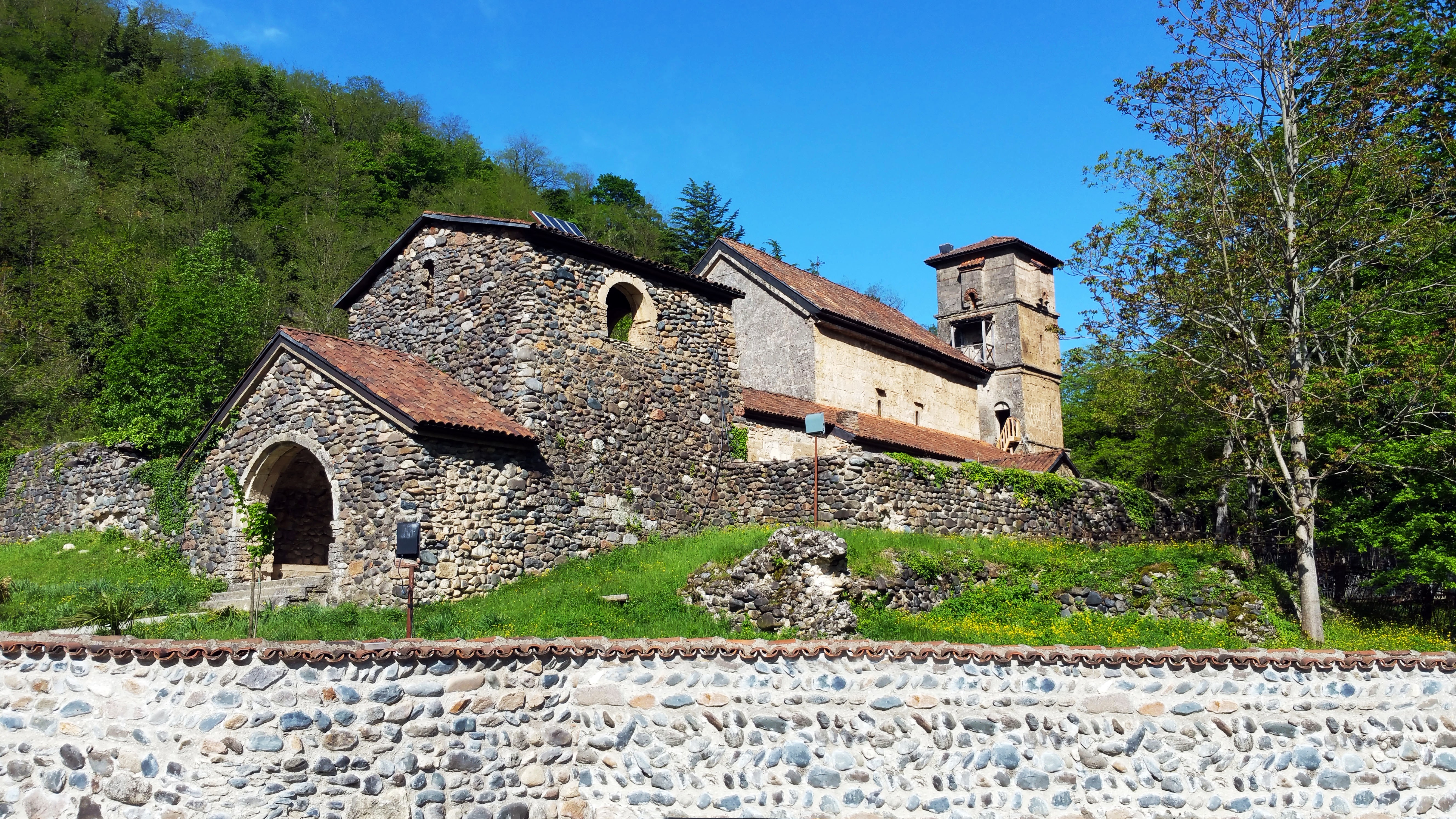 უბისას მონასტერი